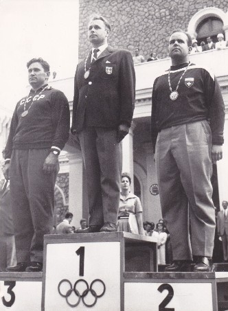 Vasily Borisov, Hubert Hammerer, Hans Rudolf Spillmann, 1960 Olympics